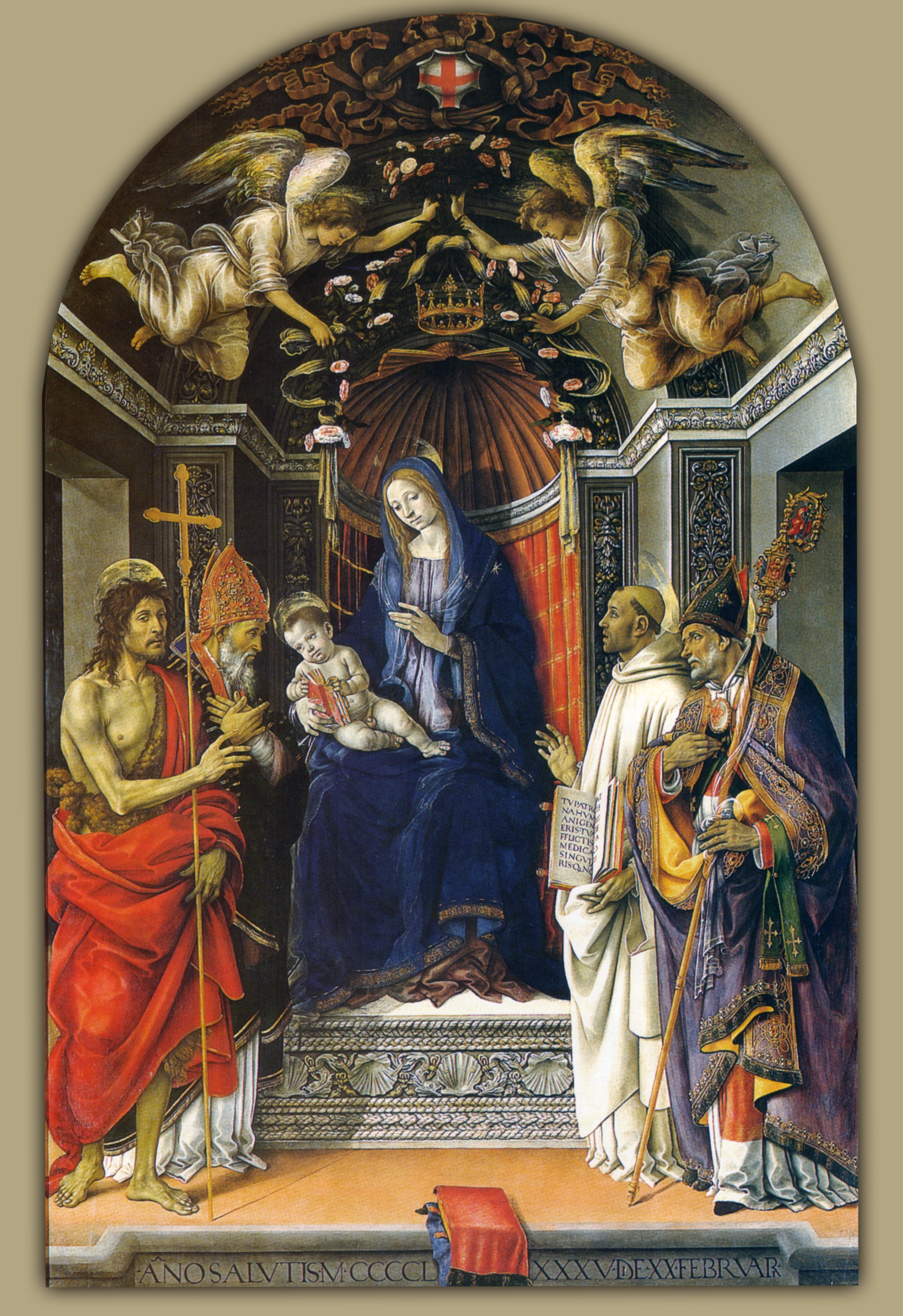 Filippino lippi, madonna col bambino e i santi g.battista, vittore, bernardo e zanobi (1485) uffizi.jpg